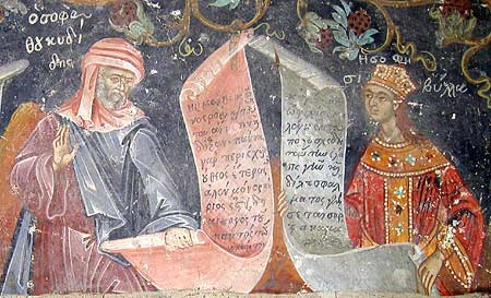 Frescoes in St Eliah Church in Siatista, Greece